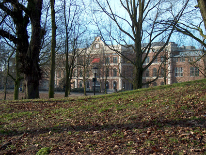 Zelfgemaakte foto